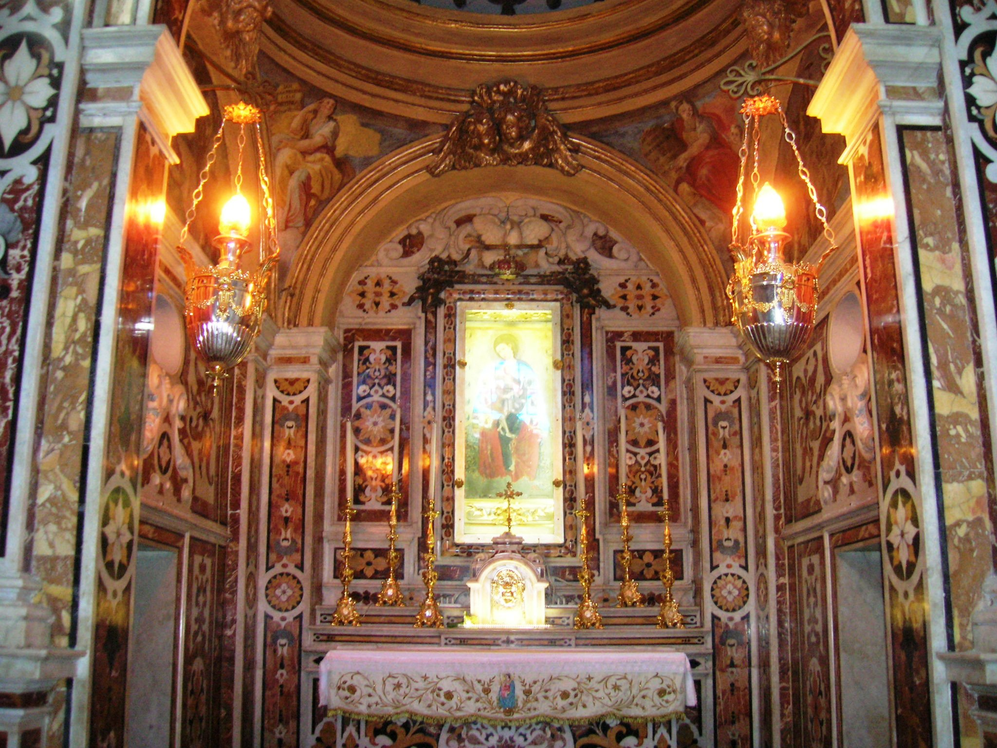 Santuario di Santa Maria di Pozzano a Castellammare di Stabia